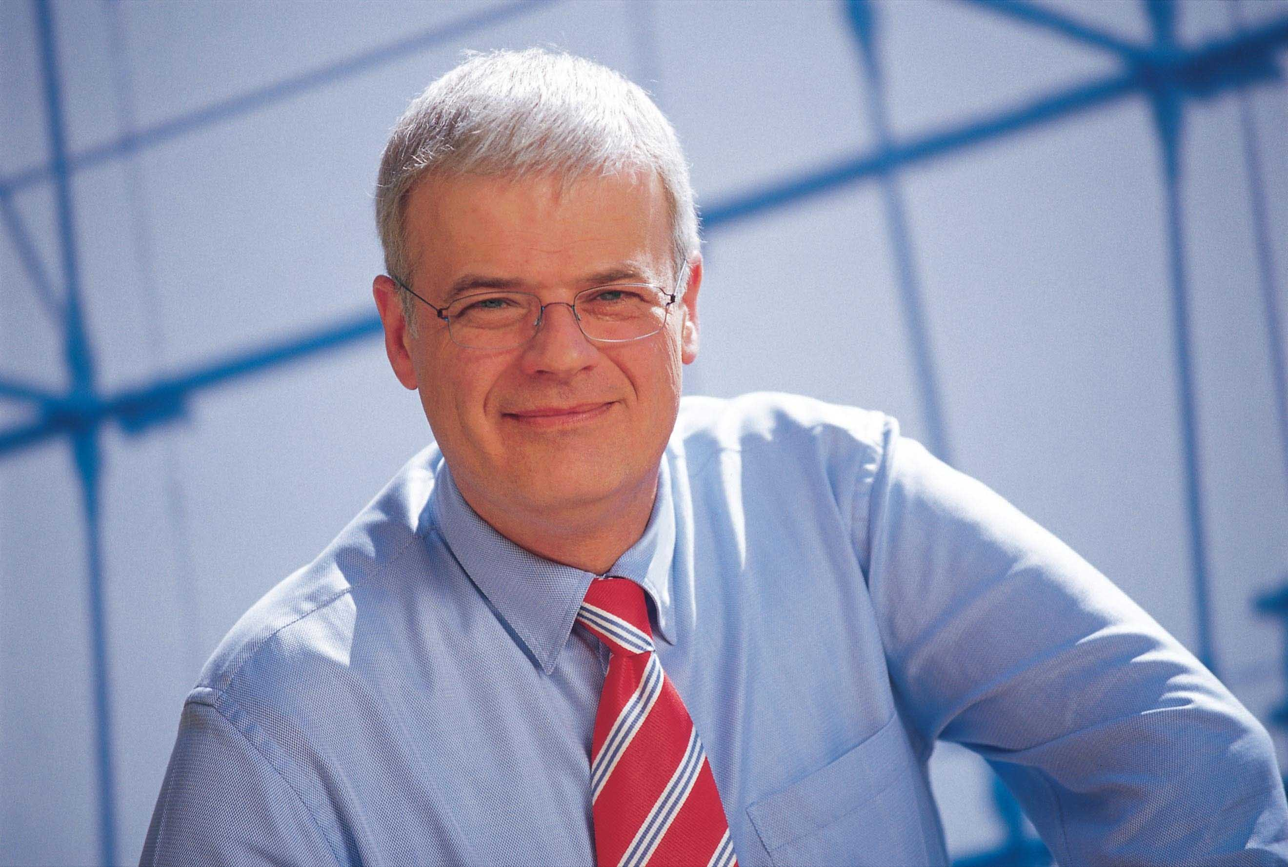 Christoph Böhr, Publizist und Politiker 2005